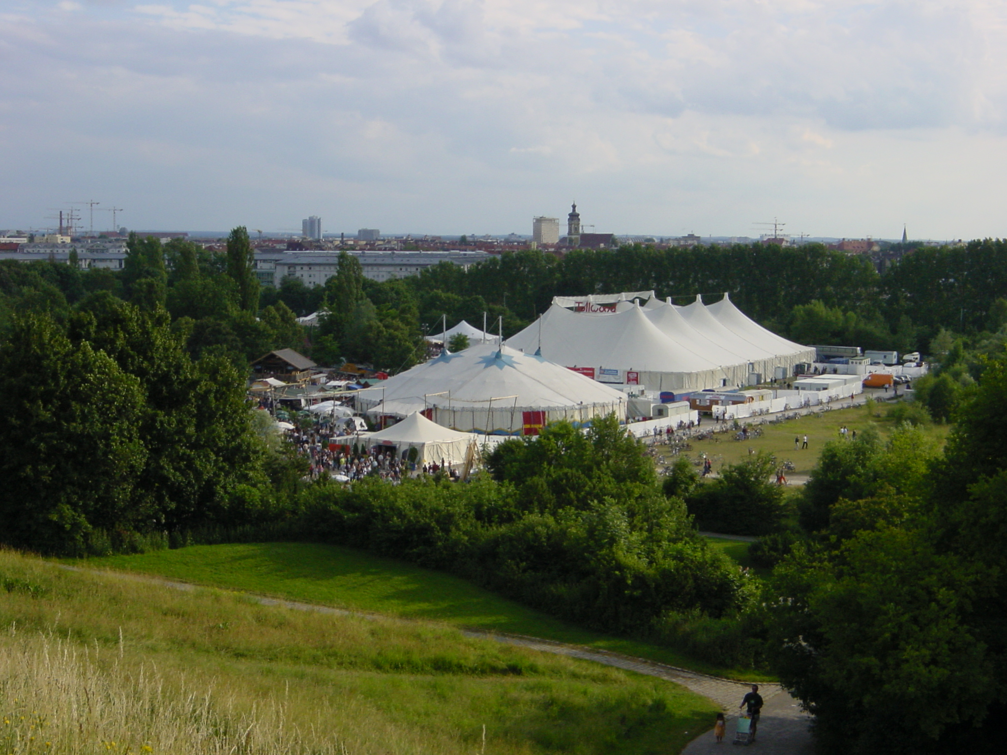 Das Zelt vom Tollwood-Festival Sommer 2001